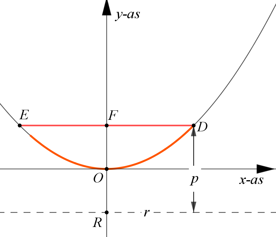 Parabool met latus rectum